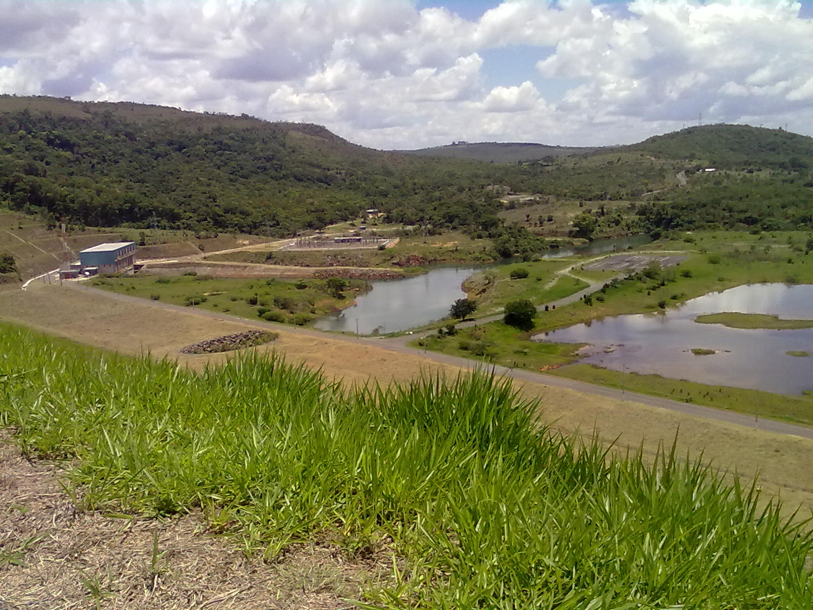 Corumbá IV